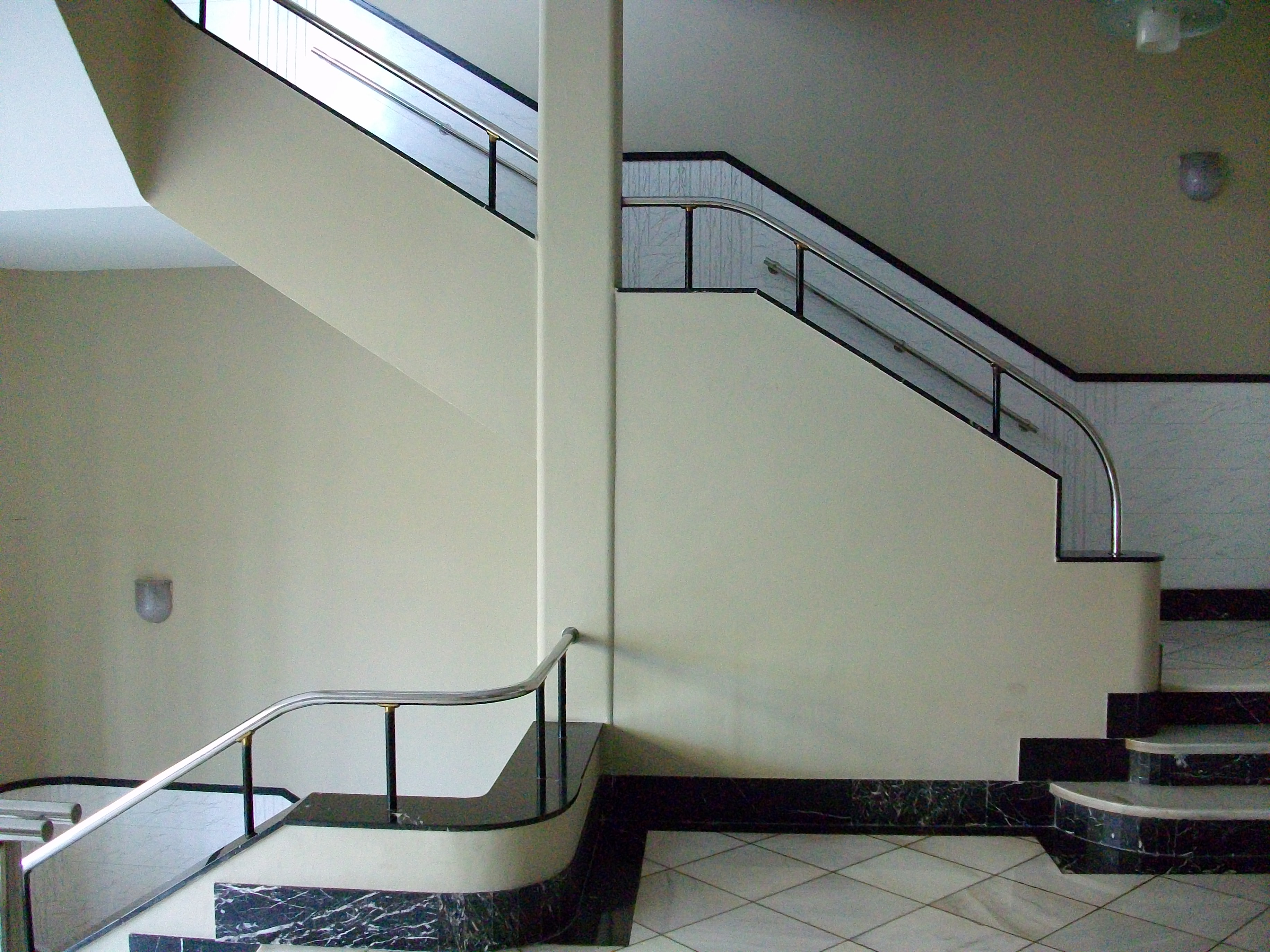 Escales de l'edifici Rialto de València.